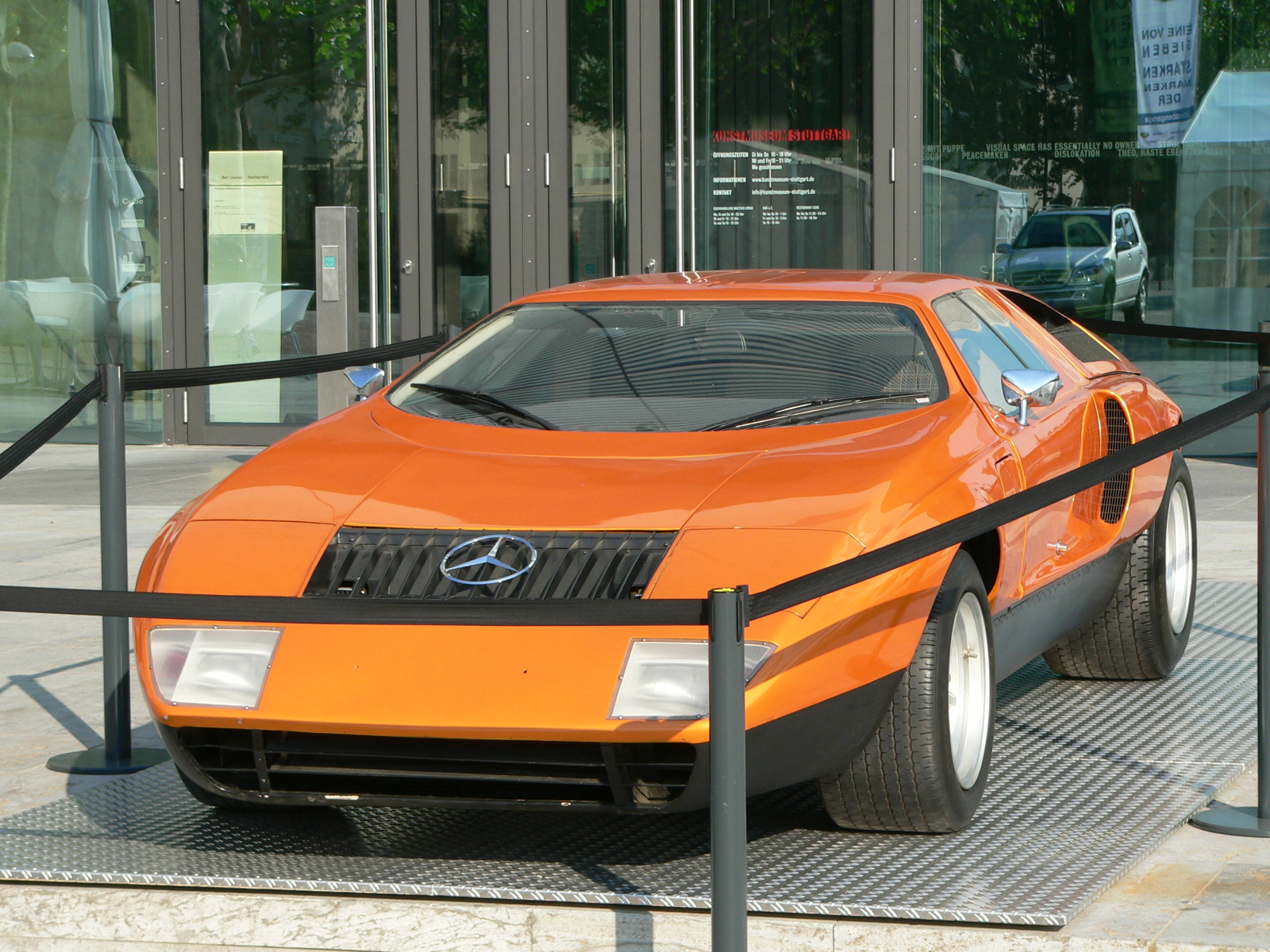 Description: Mercedes-Benz C111 in Stuttgart, Germany, Koenigstrasse Mercedes-Benz C111 in Stuttgart, Königstraße vor dem Kunstmuseum Date: 2005-05-29 photographer: JuergenG Wikipedia account